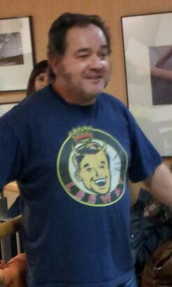 A la presentació del llibre de Paula Bonet.